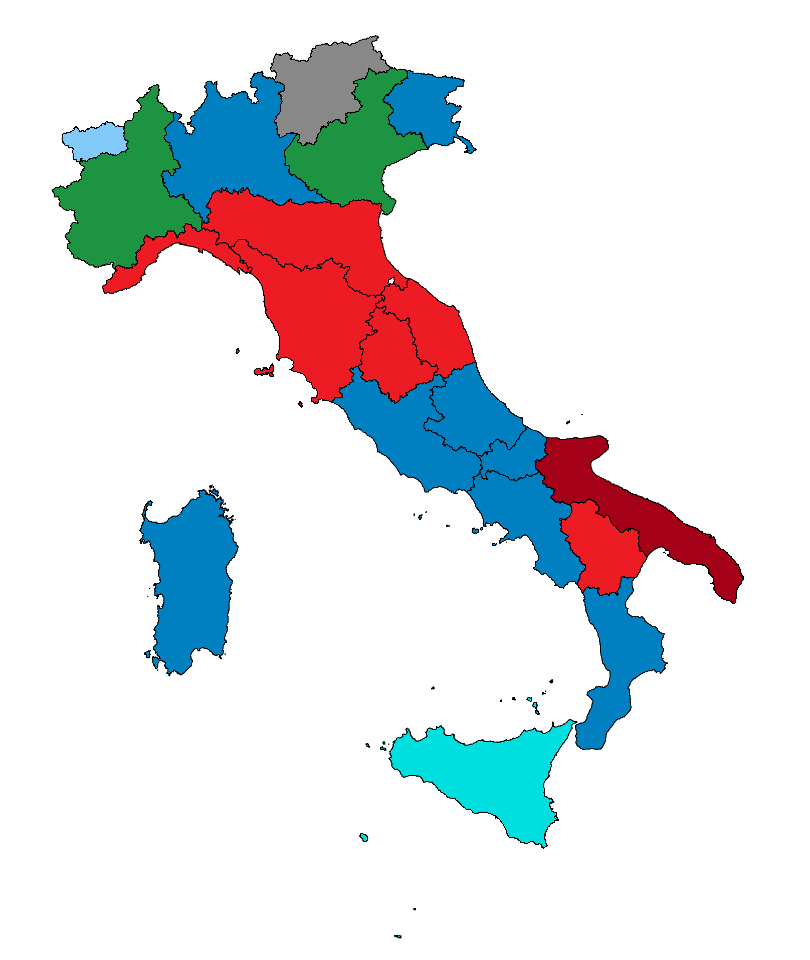 Presidenti delle regioni italiane dopo le Regionali 2010